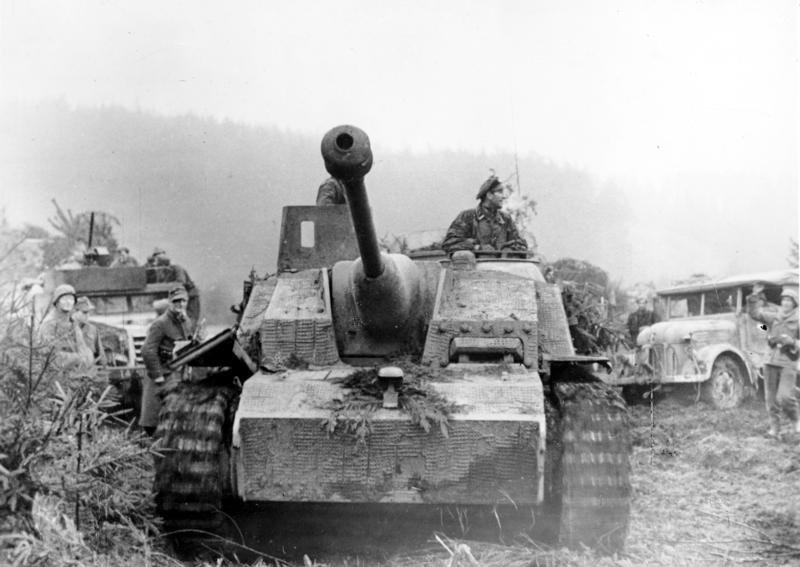 Ardennnenoffensive, Sturmgeschütz ADN-ZB / Archiv II.Weltkrieg 1939-45 Ardennenoffensive der deutschen Wehrmacht vom 16.12.1944 bis Ende Januar 1945. - Ein Sturmgeschütz der Waffen-SS im Einsatz Aufnahme: Januar 1945 / Pospesch [Scherl Bilderdienst]